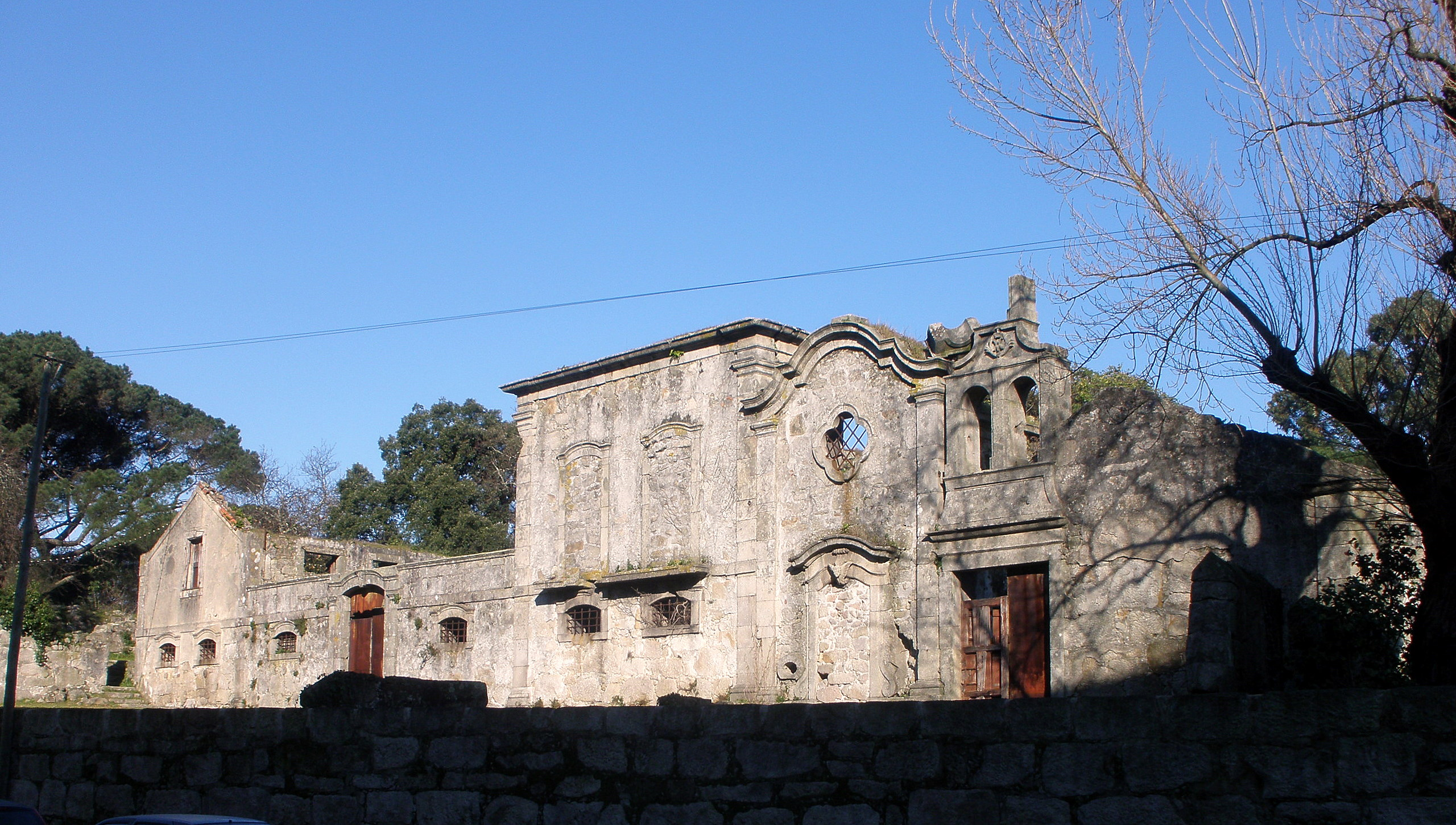 Quinta do Covelo, Porto, Portugal.